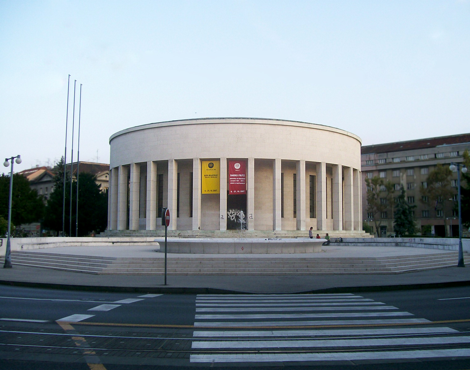 Zgrada HDLU (popularno Džamija)